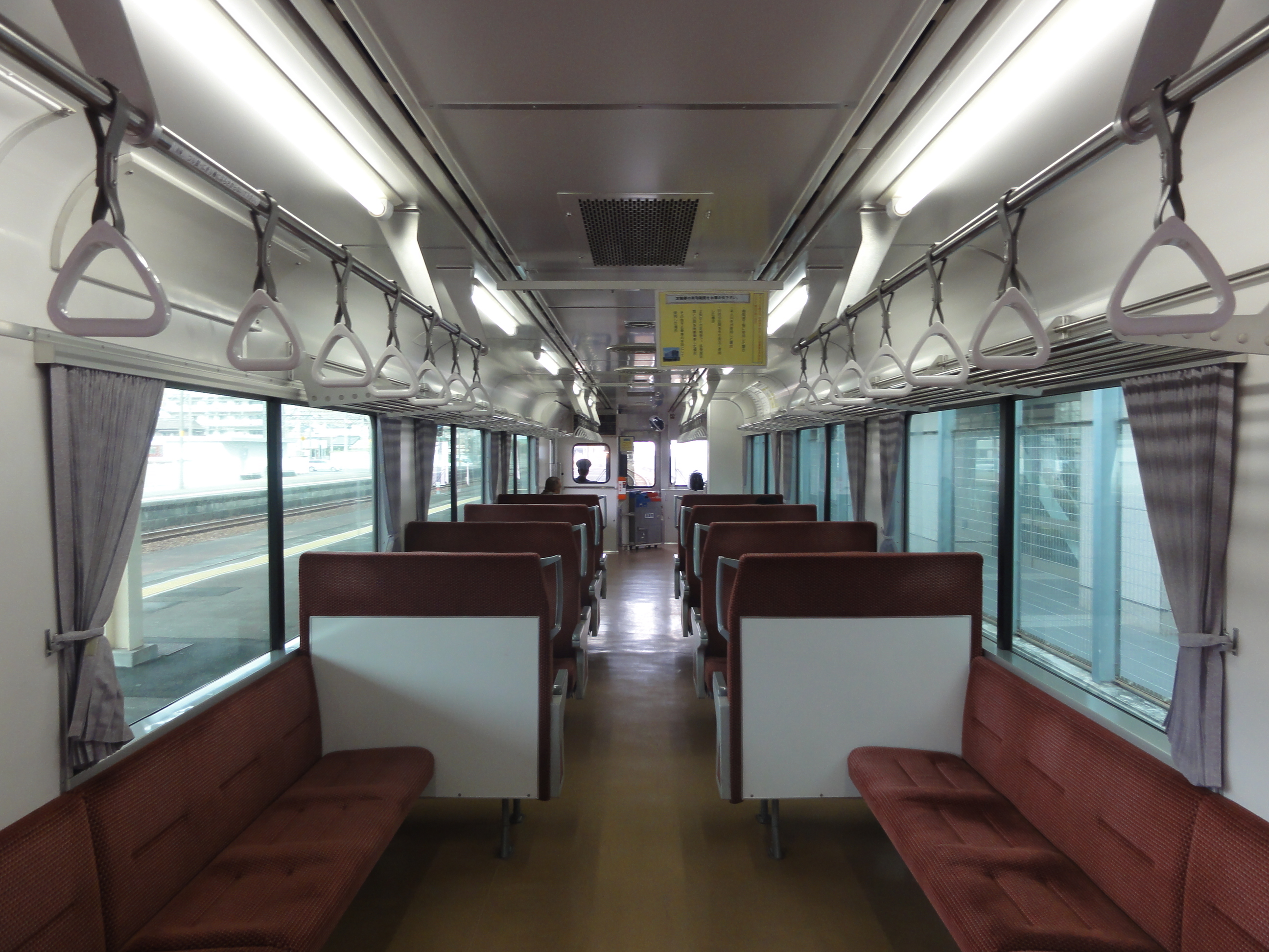 伊勢鉄道 イセⅢ形気動車・車内